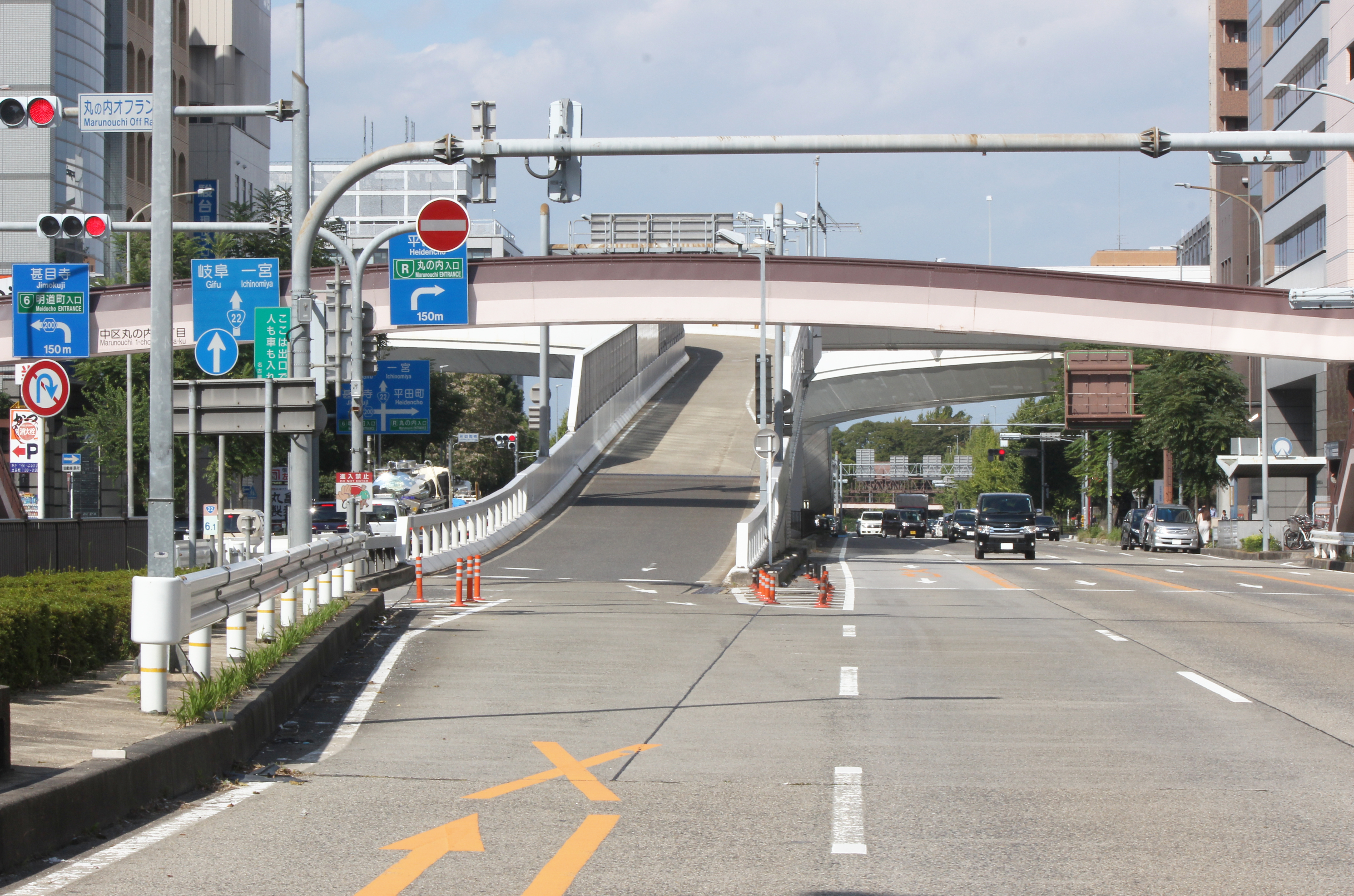 名古屋高速都心環状線 丸の内出口